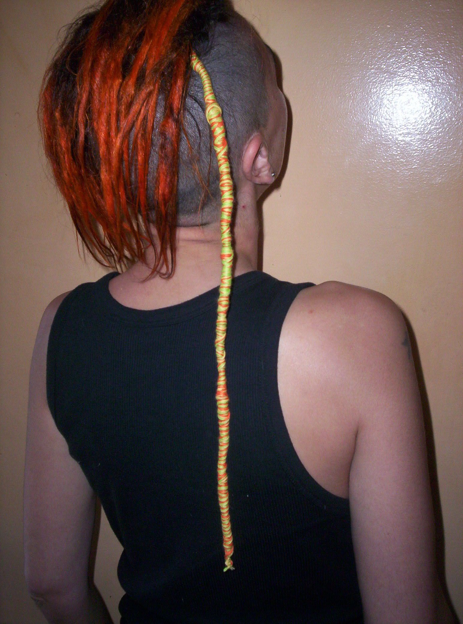 atébas en laine terminé